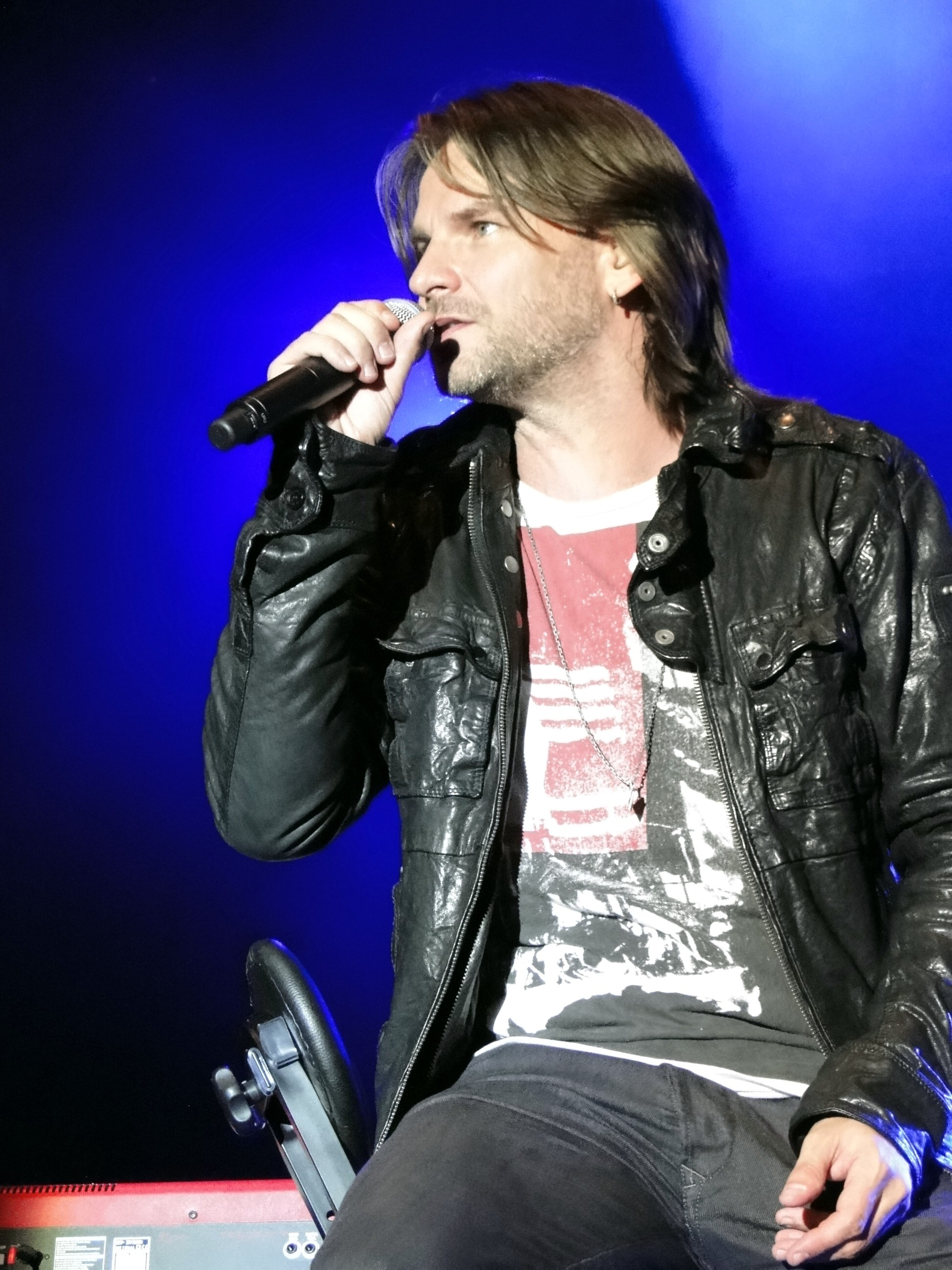 Ray Wilson, Sänger der Band Stiltskin und früherer Sänger der Band Genesis, auf einem Solokonzert im August 2010